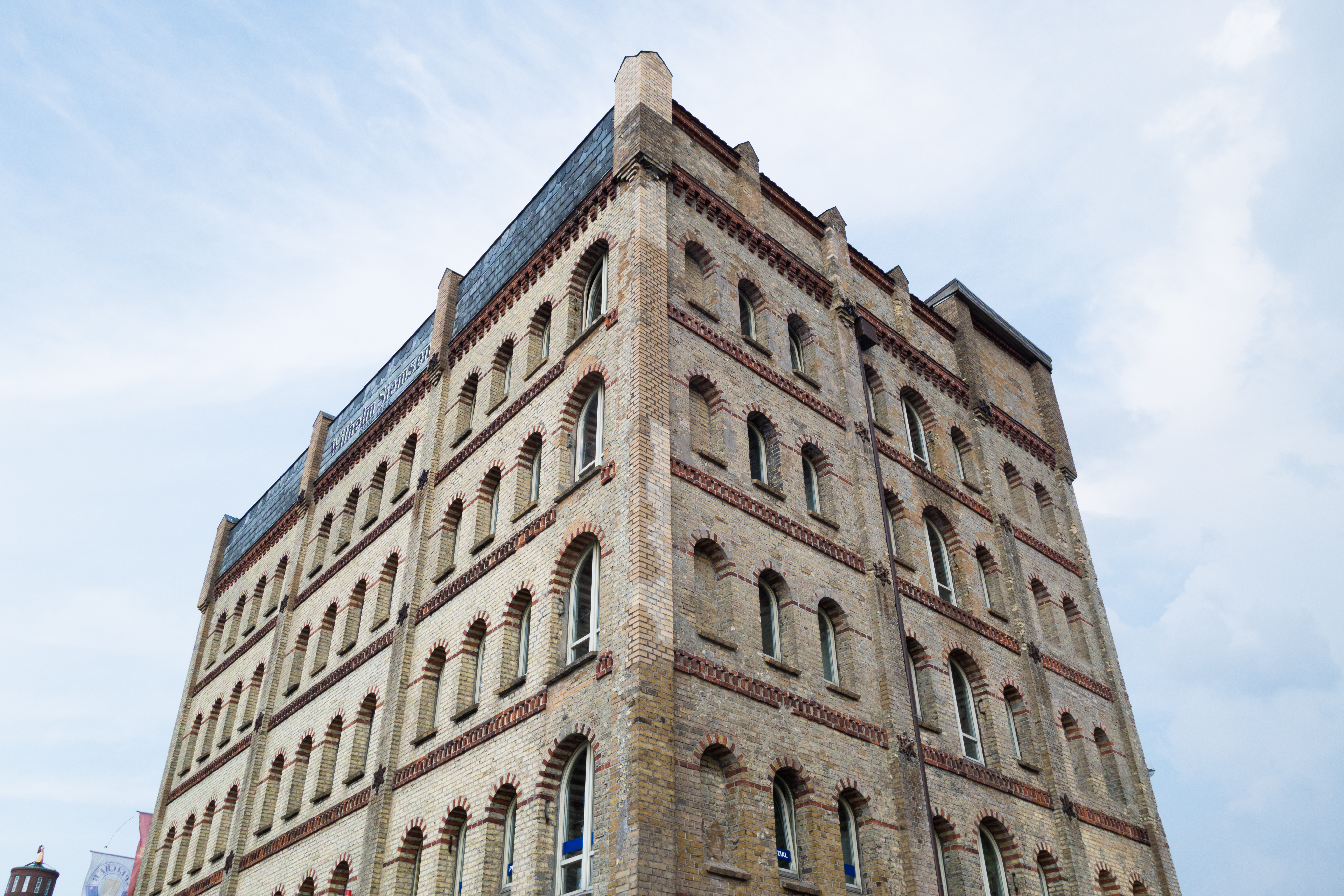 Eckernfoerde, Germany, 2014